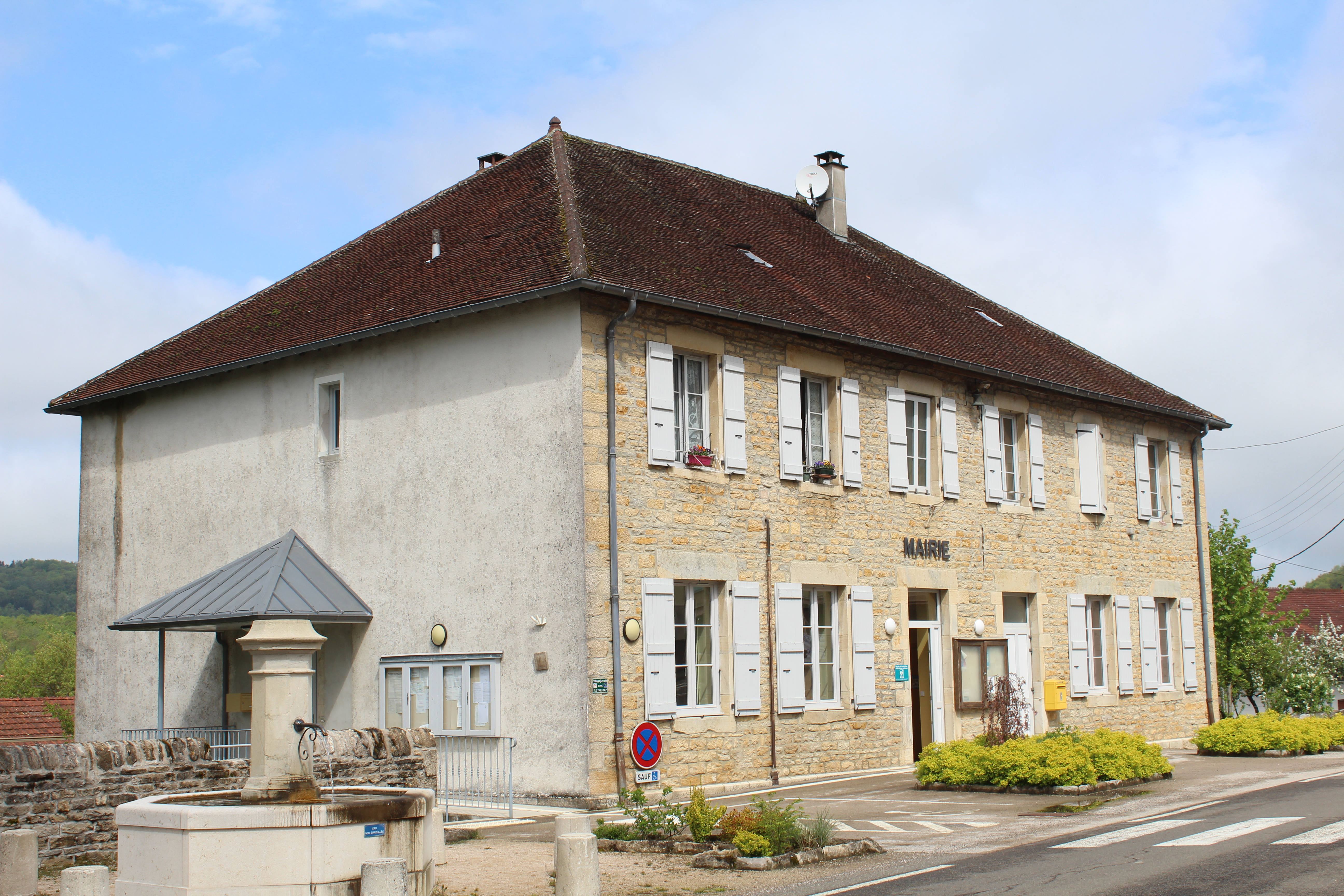 Mairie de Cressia.